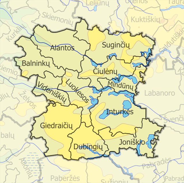 Padaryta iš :image:LietuvosSeniunijos.png